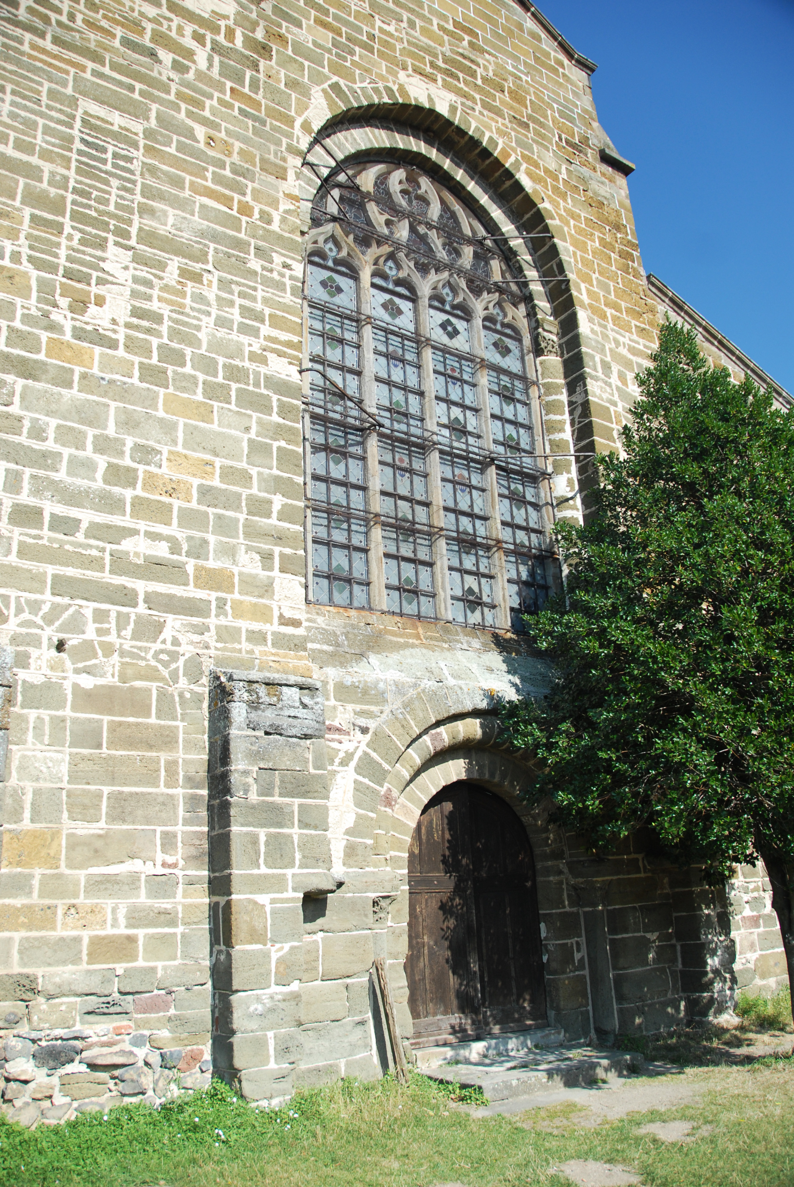 Chanteuges, Kirche, Fassade, Hauptportal